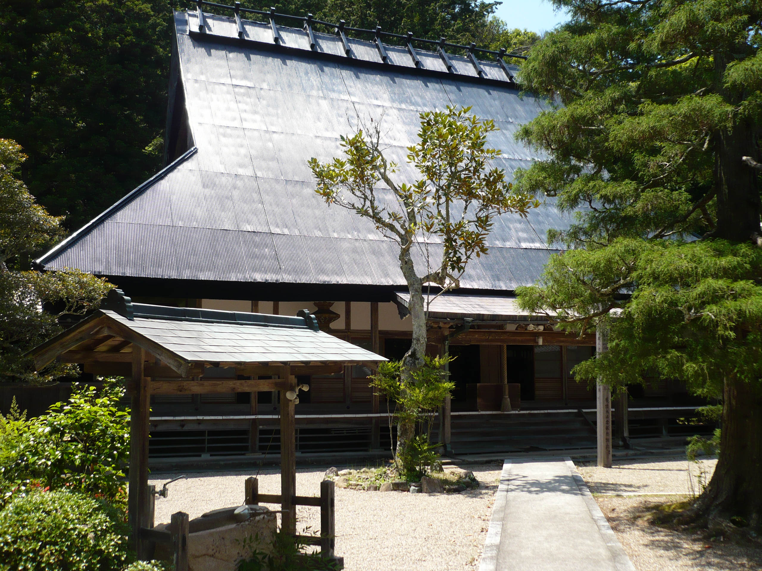 本堂